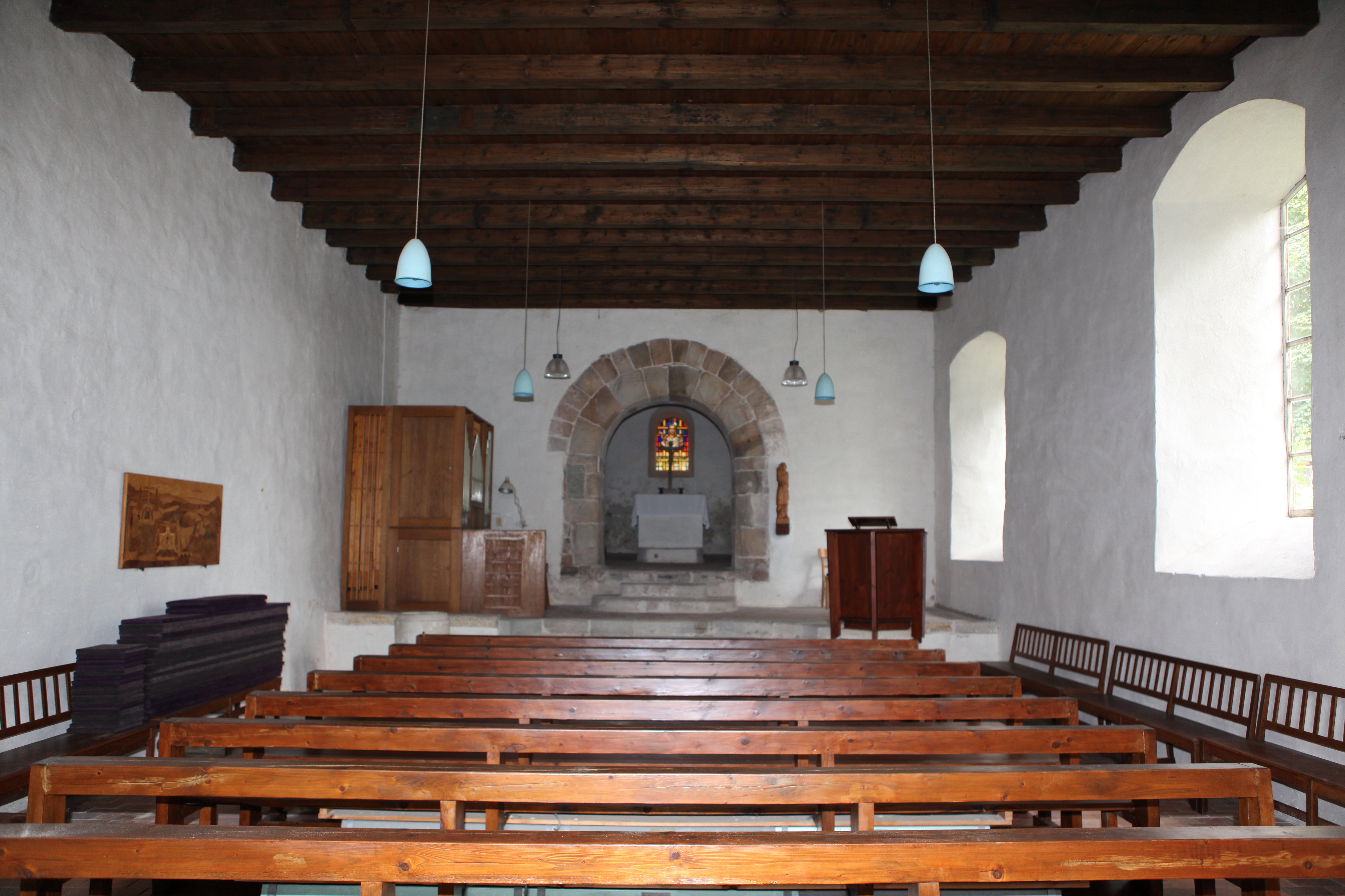 Friedhofskirche St. Andreas Ummerstadt